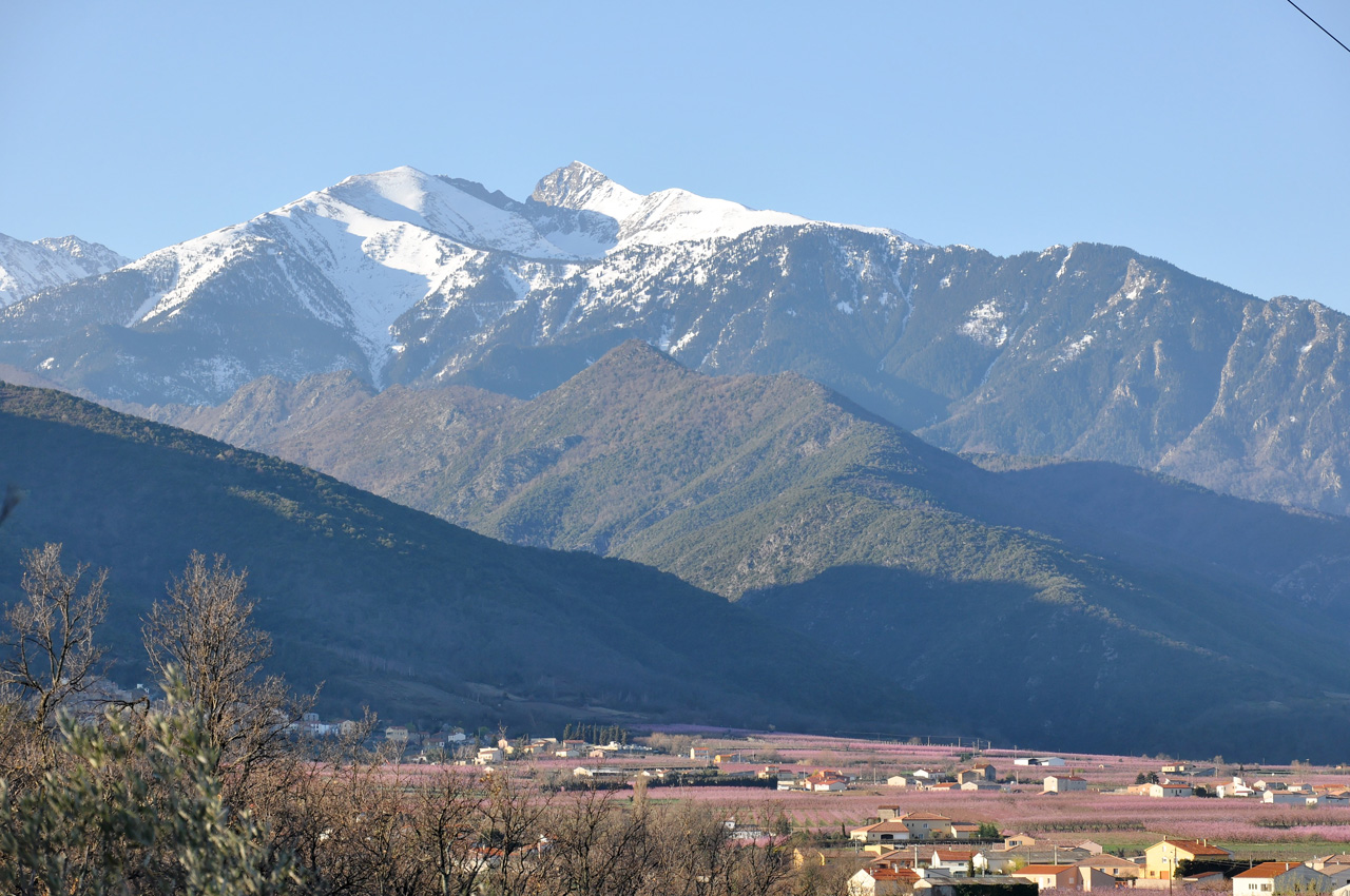 Le Canigou (2784 m) aux environs de Vinça